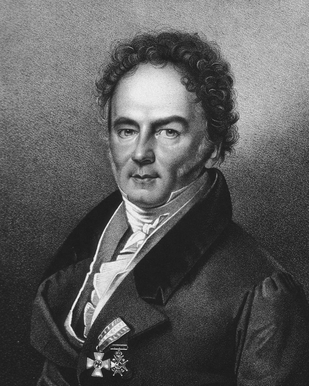 Adam Elias von Siebold (* 5 March 1775 in Würzburg; † 12 June 1828 in Berlin)